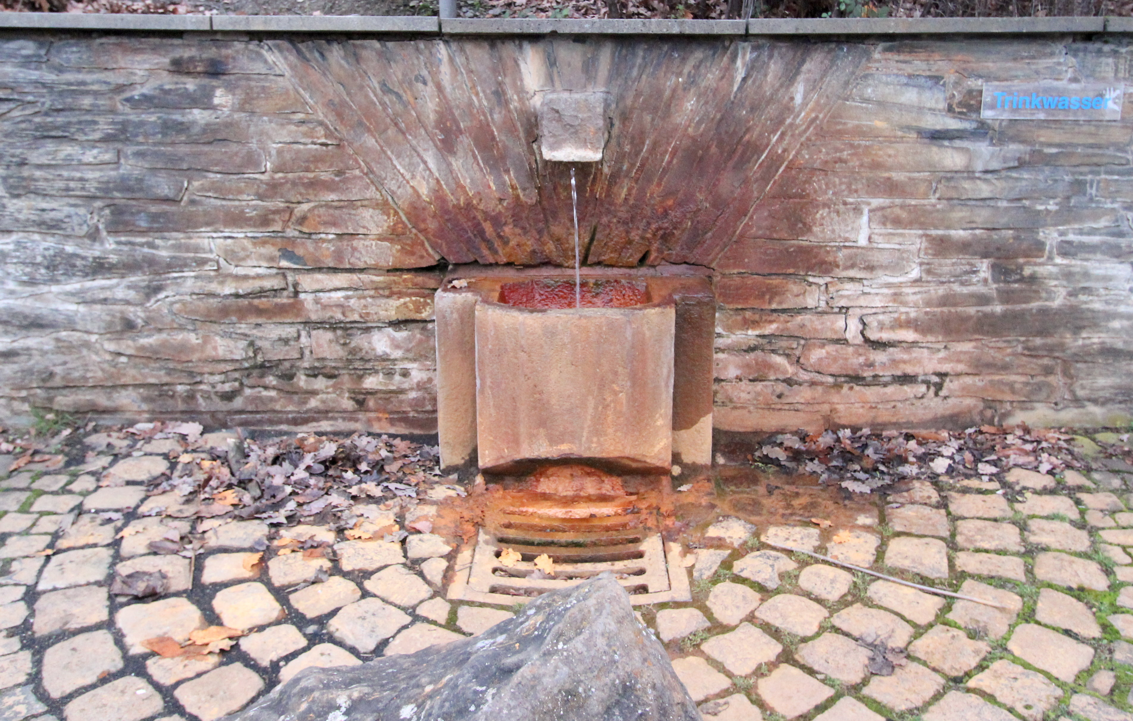 56651 Niederzissen, Am Sauerbrunnen in Richtung Wehr. Der Sauerbrunnen kommt mit Kohlensäure und zahlreichen Mineralien versetztes Mineralwasser an die Oberfläche. Da das Wasser nicht enteisent wird, kann man an der rostbraunen Färbung den starken Eisenanteil erkennen. Aufnahme von 2017.